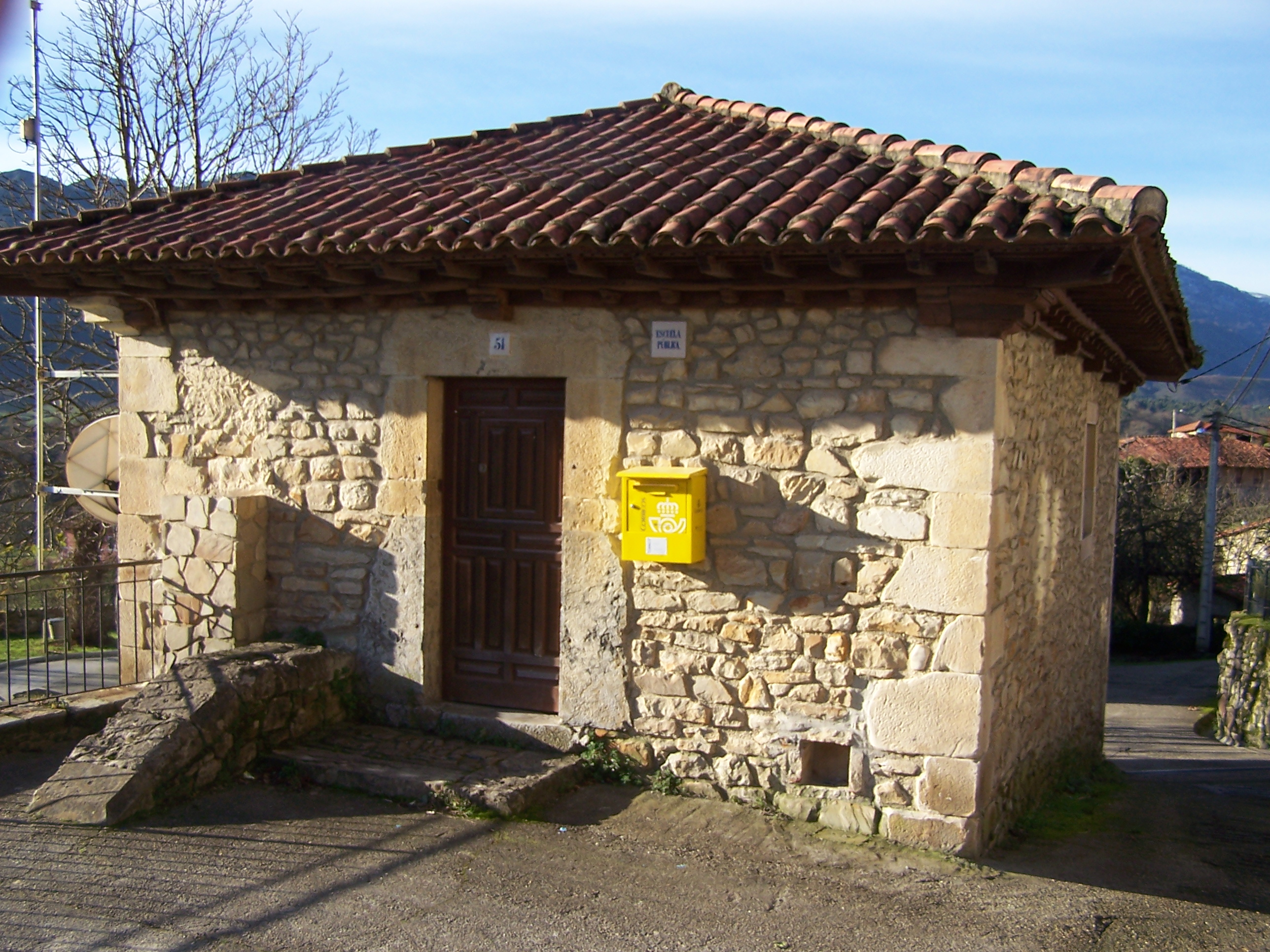 Antigua escuela rural del pueblo de Tesgrandas